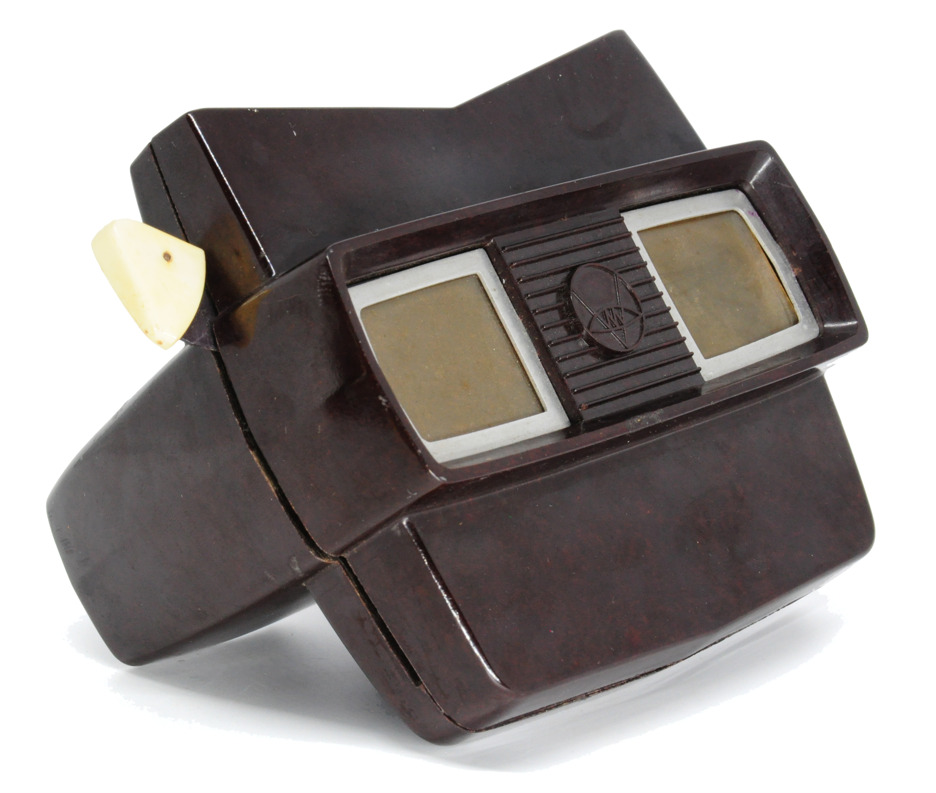 กล้องวิว-มาสเตอร์ โมเดล E